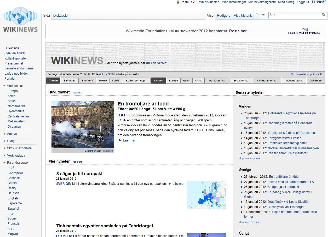 Svenska Wikinews första sida den 24/2-2012